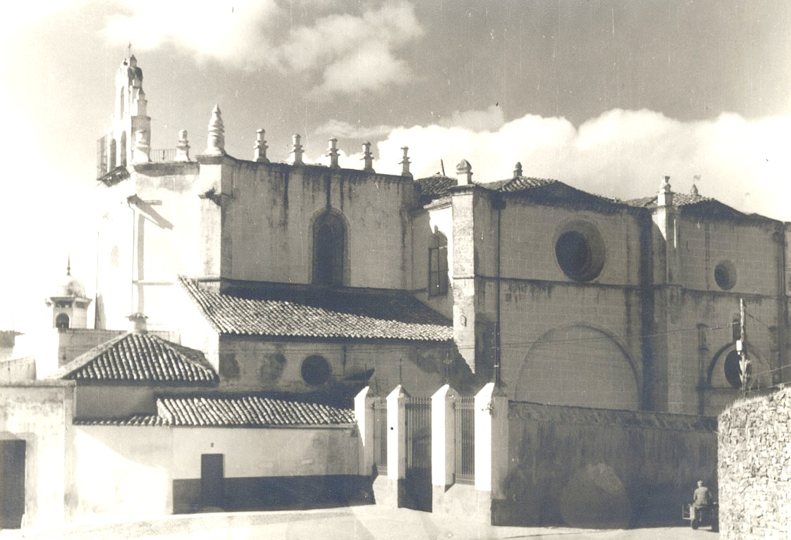 Iglesia del Rosario de Zafra